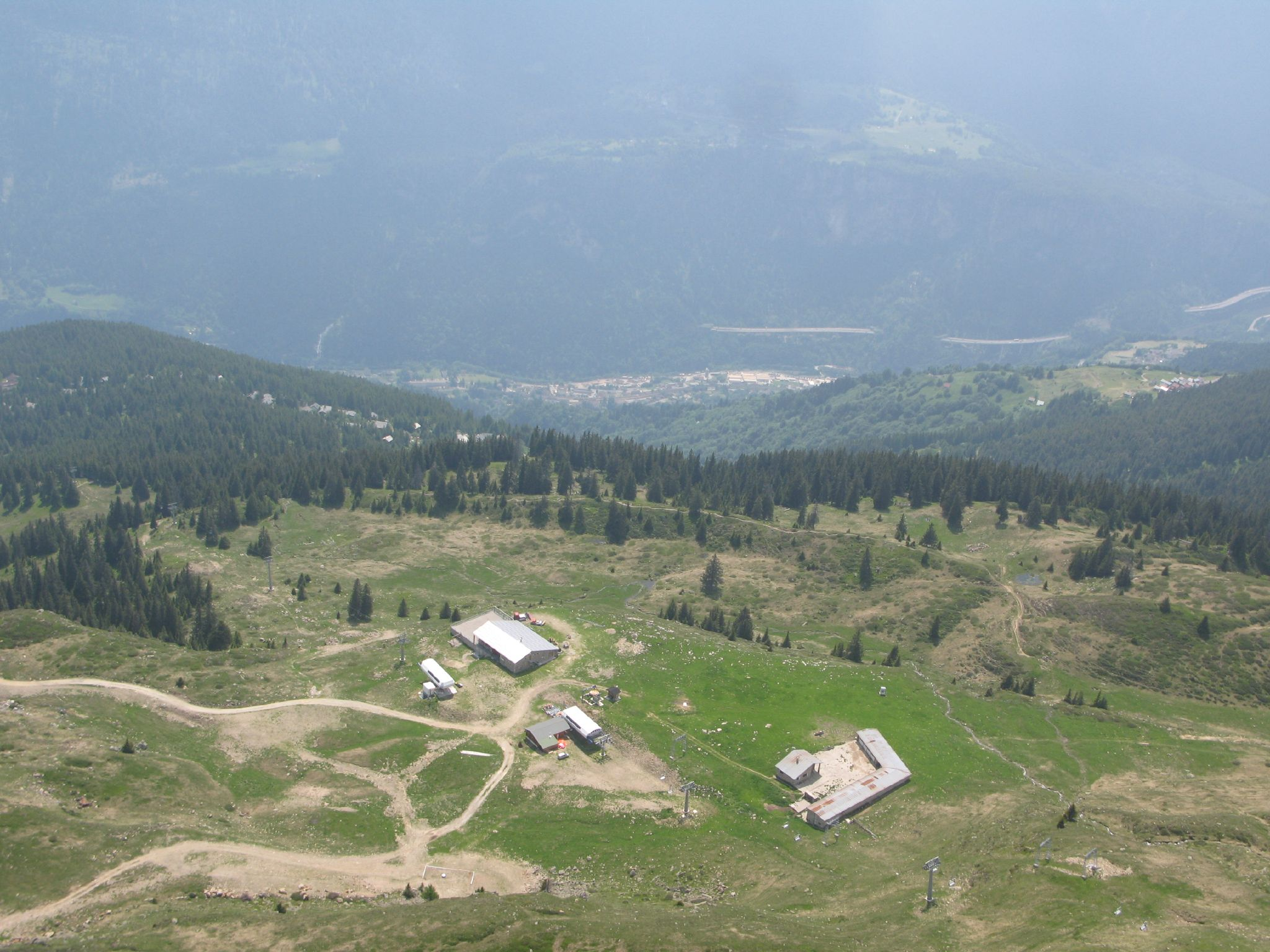 Ristorante Carì 2000, Ticino